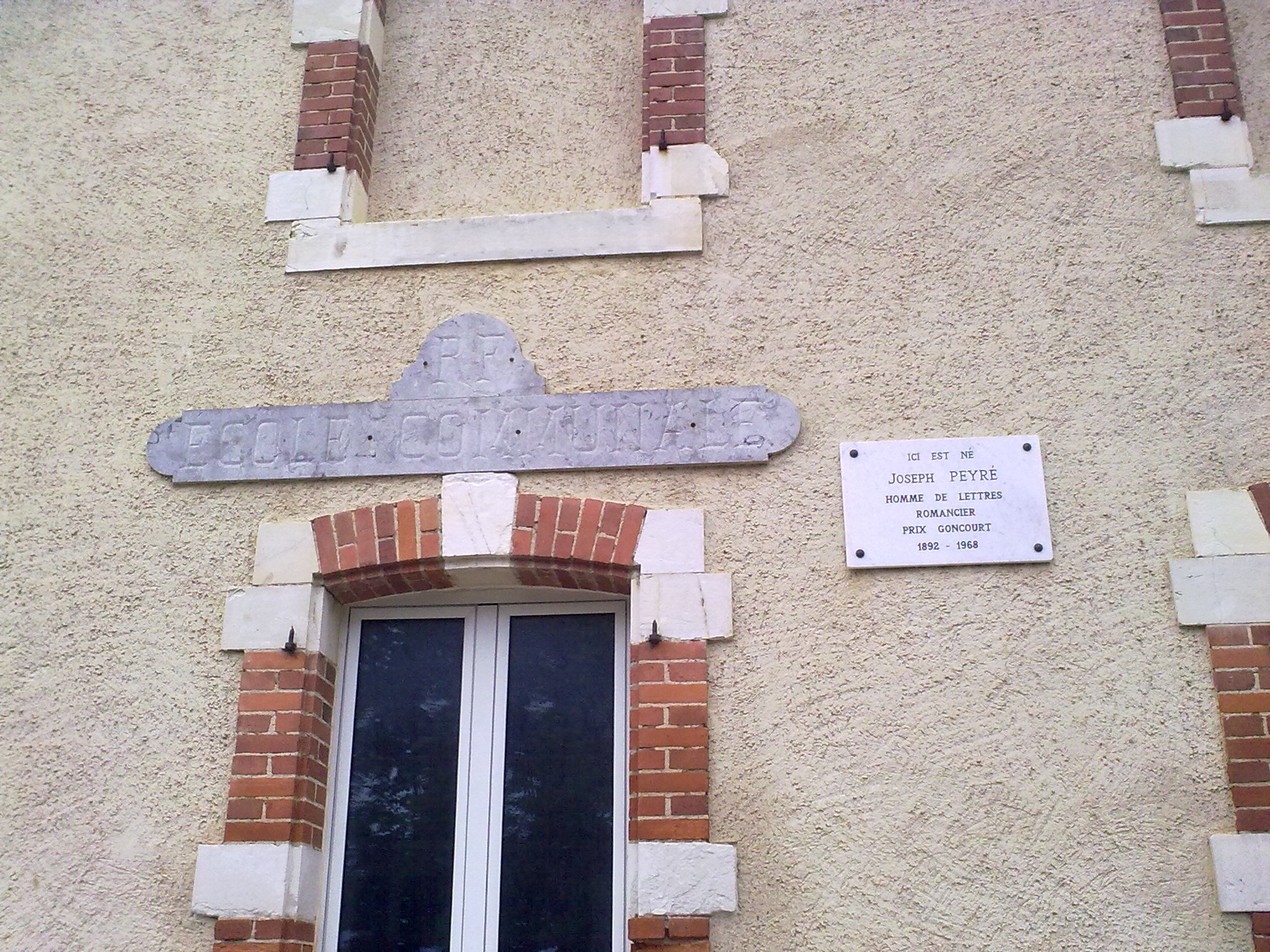 Aydie